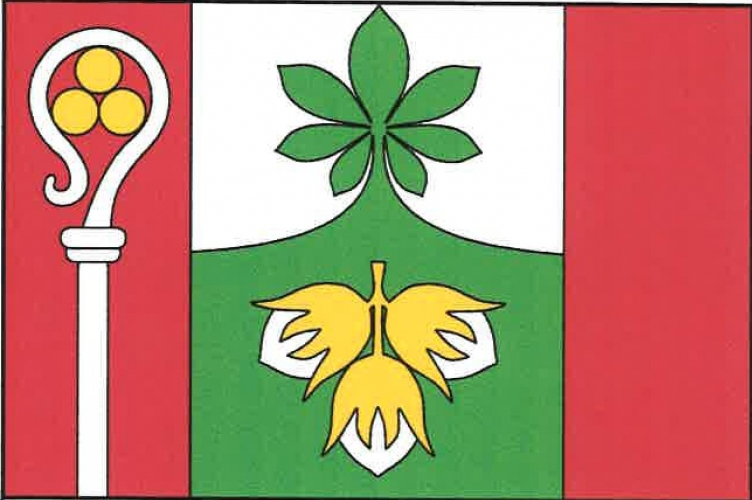 Lískovice (okres Jičín), vlajka obce. List tvoří tři svislé pruhy, červený, bílo-zeleně vydutě dělený a červený, v poměru 1 : 2 : 1. Z dolního okraje žerďového pruhu vyniká bílá berla závitem k žerďovému okraji listu, se třemi (1, 2) žlutými koulemi v hlavici. Ve vydutém zeleném poli zakončeném listem jírovce, dotýkajícího se horního okraje, tři svěšené bílé lískové oříšky na žluté stopce. Poměr šířky k délce listu je 2 : 3.